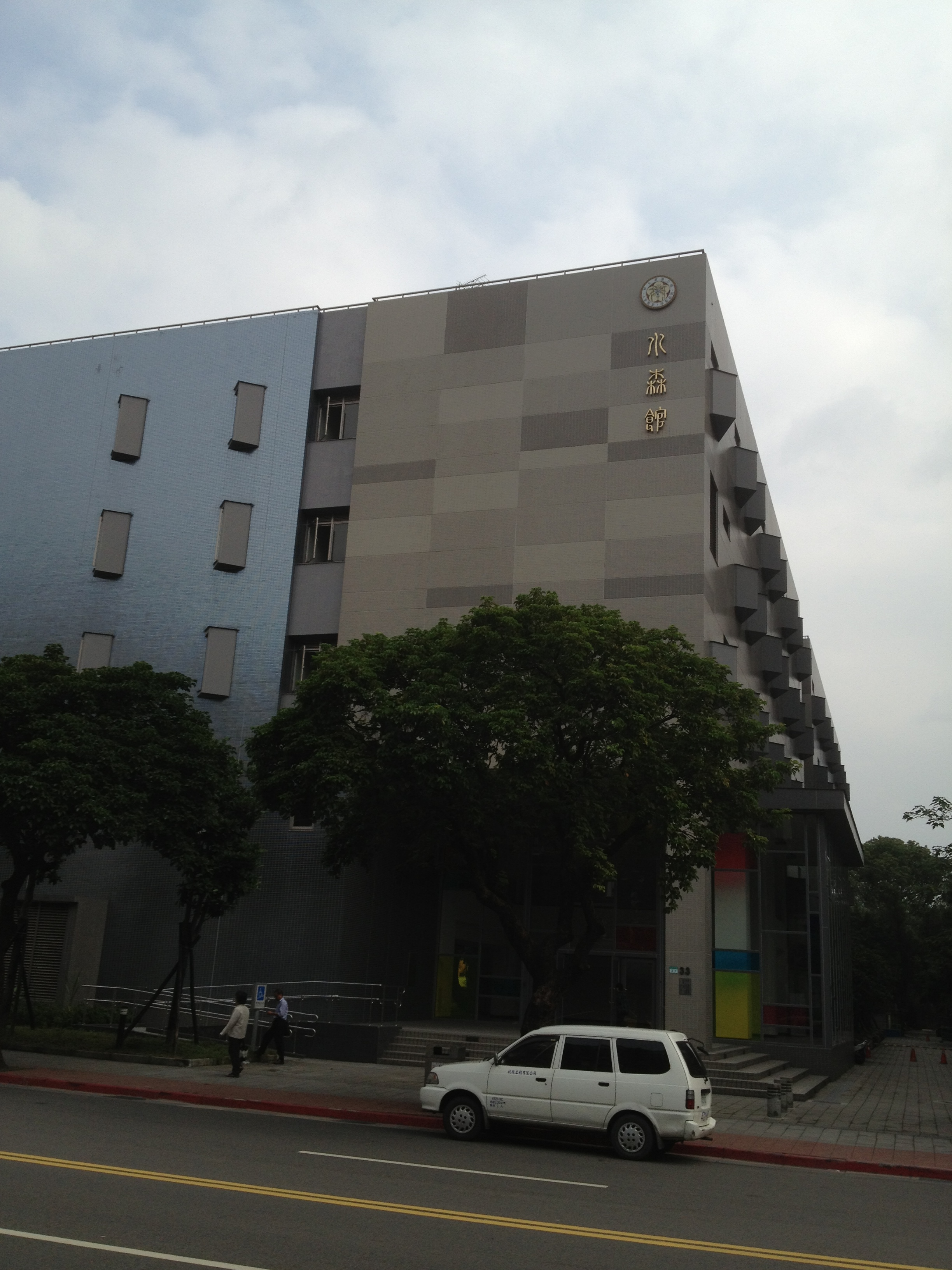 中文（台灣）: 藥學系新館